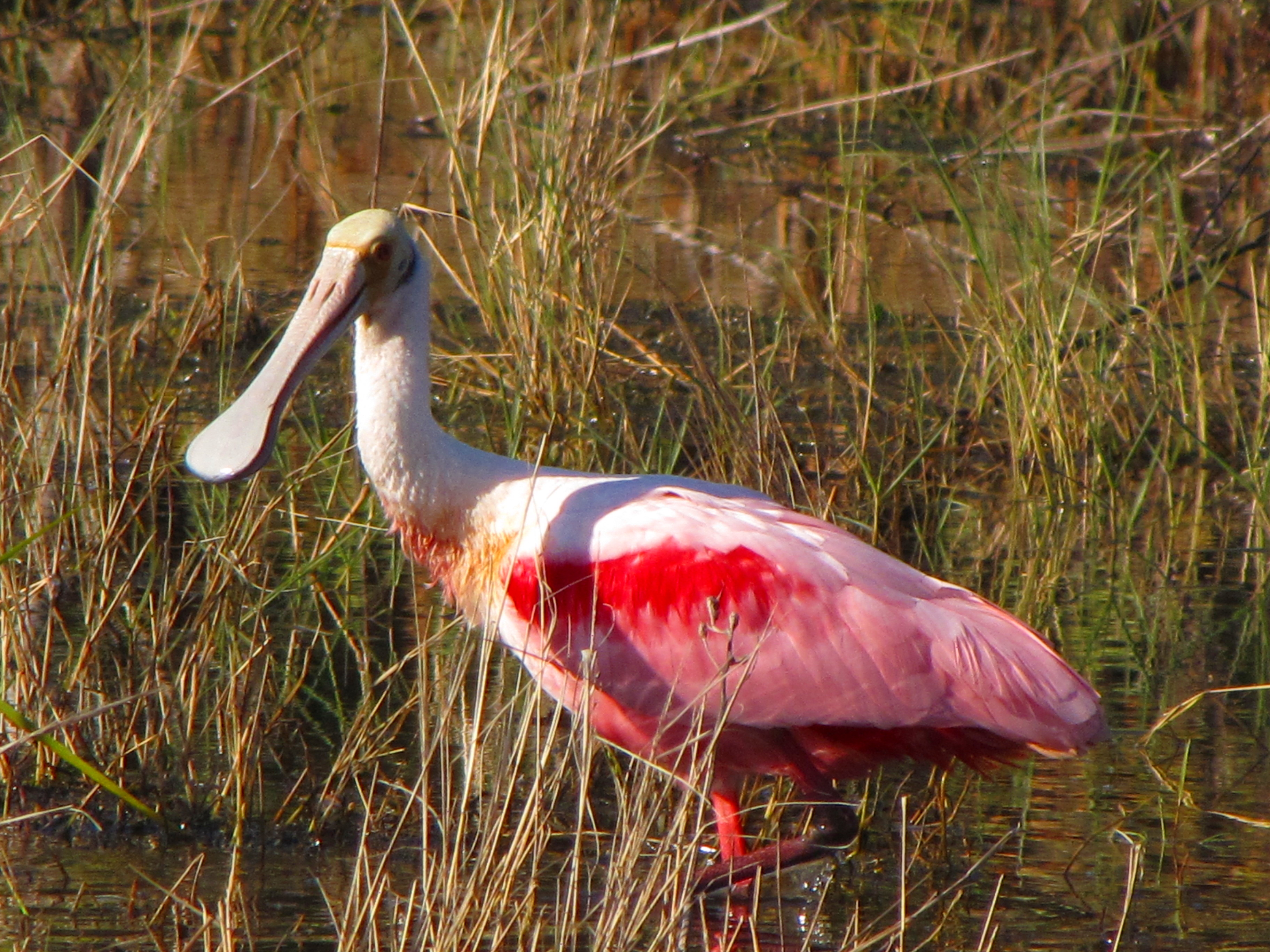 Roseate Spoonbill 9 Platalea ajaja